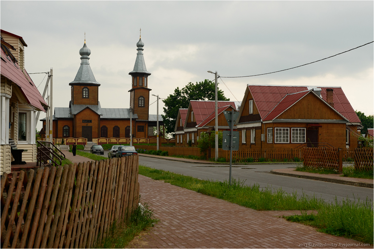 Лясковичи, агрогородок в Белоруссии